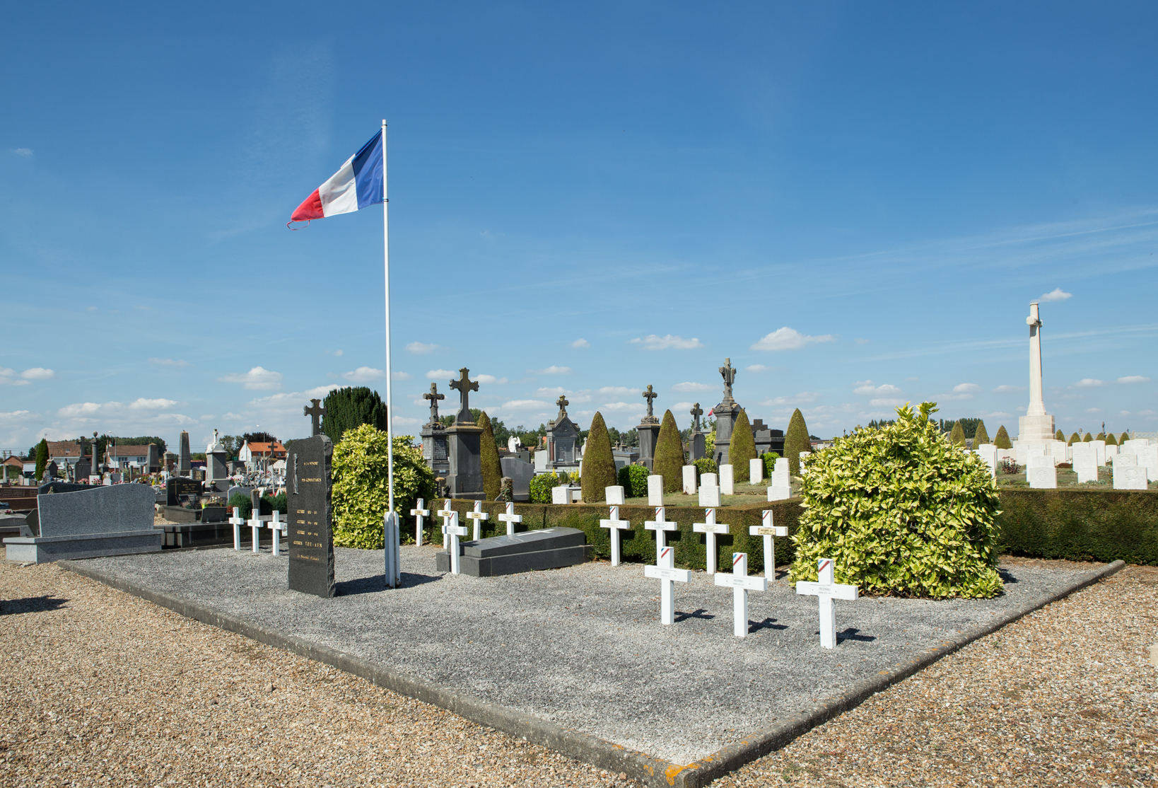 Aire Communal Cemetery